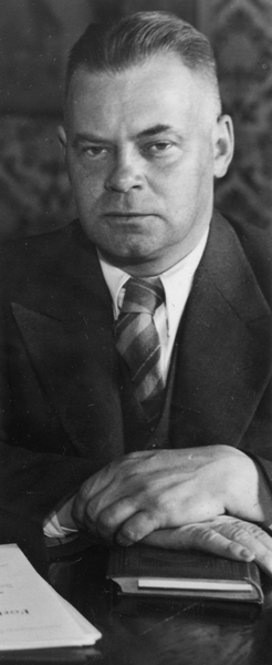 portrett, mann, historiker, litteraturkritiker, brystbilde.